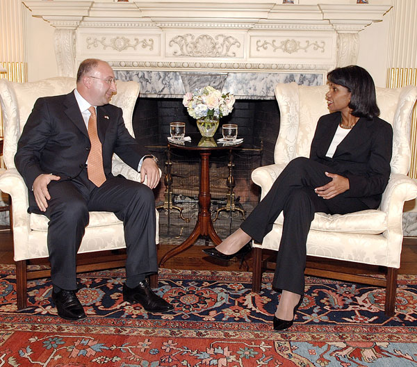 Gela Bezhuashvili and Condoleezza Rice.